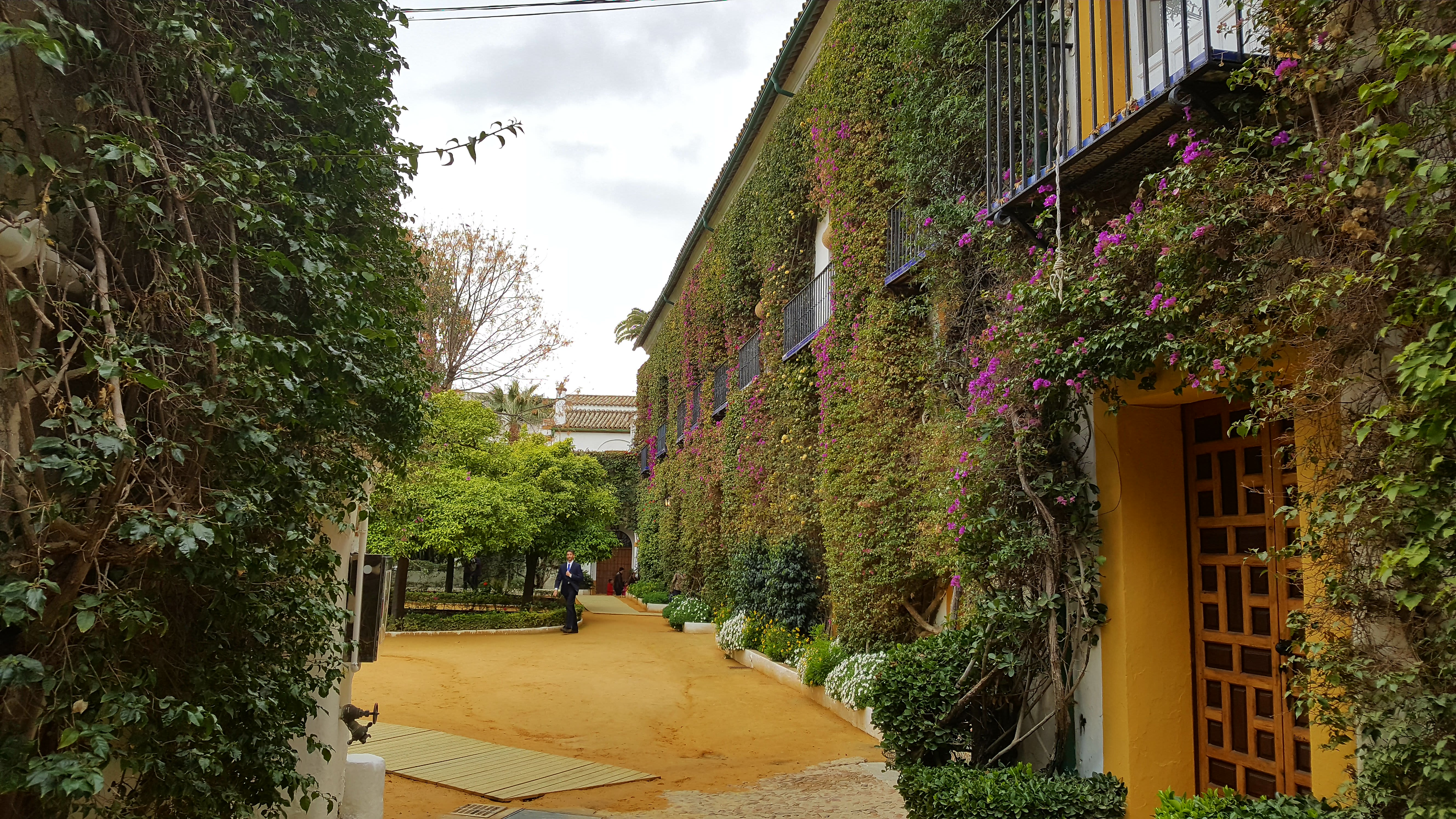 Fachada en el patio de entrada. Palacio de las Dueñas, Sevilla.